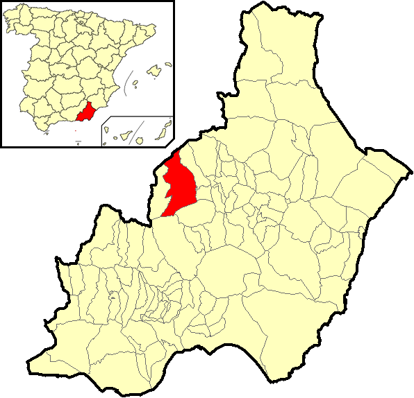 Situación del término municipal de Serón respecto a la provincia de Almería, en España.